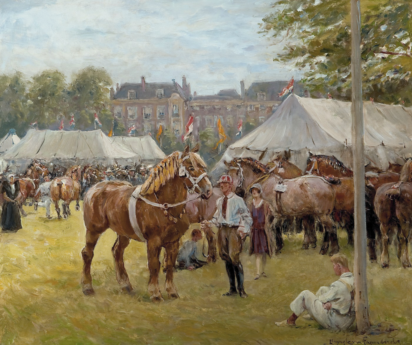 De nationale trekpaardententoonstelling op het Malieveld oil on canvas 65 x 80 cm signed b.r.: J. Hoynck van Papendrecht